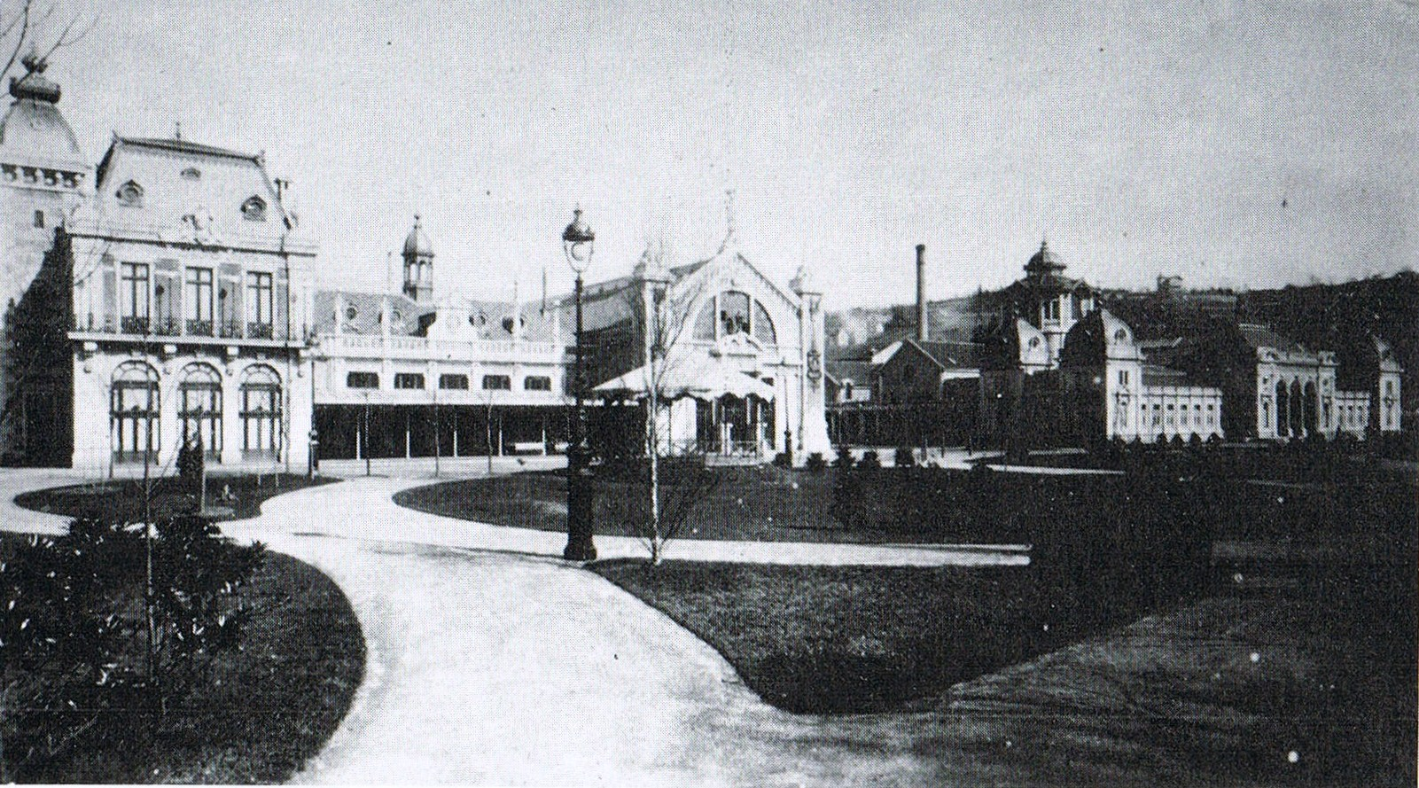 Complexe thermale de Besançon-les-Bains.